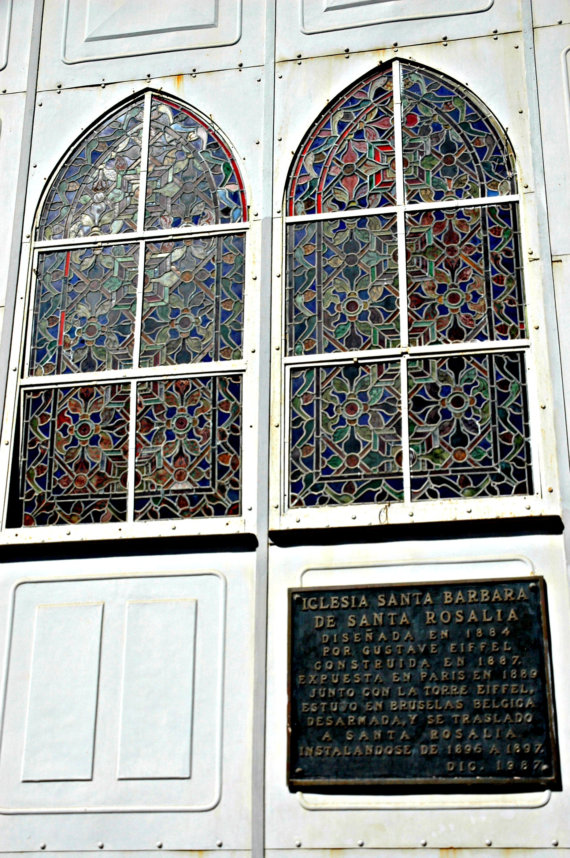 Iglesia Santa Barbara en Santa Rosalia, Baja California Sur, Mexico: "Iglesia Santa Barbara de Santa Rosalia Disenada en 1884 por Gustave Eiffel construida en 1887 Expuesta en Paris en 1889 junto con La Torre Eiffel, Estuyo en Bruselas Belgiga desarmaga, y se traslado a Santa Rosalia Instalandose de 1896 a 1897. Dic. 1887"